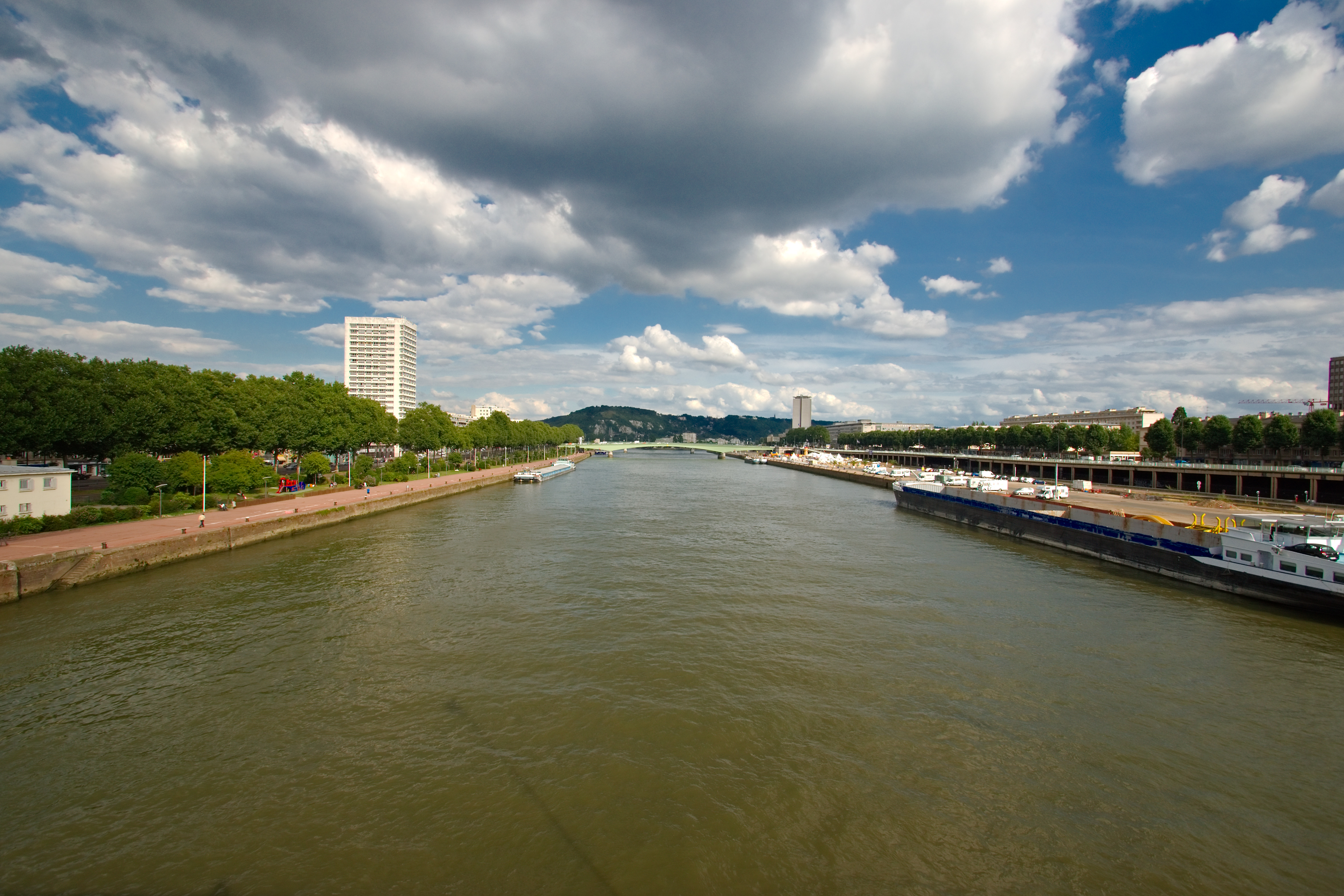 La Seine à Rouen vue depuis le pont Guillaume-le-Conquérant